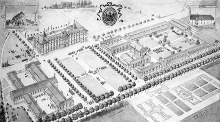 Bern, Kantonale Militäranstalten, Papiermühlestrasse 13-17, Vogelschaubild (Plan) aus dem Jahr 1876